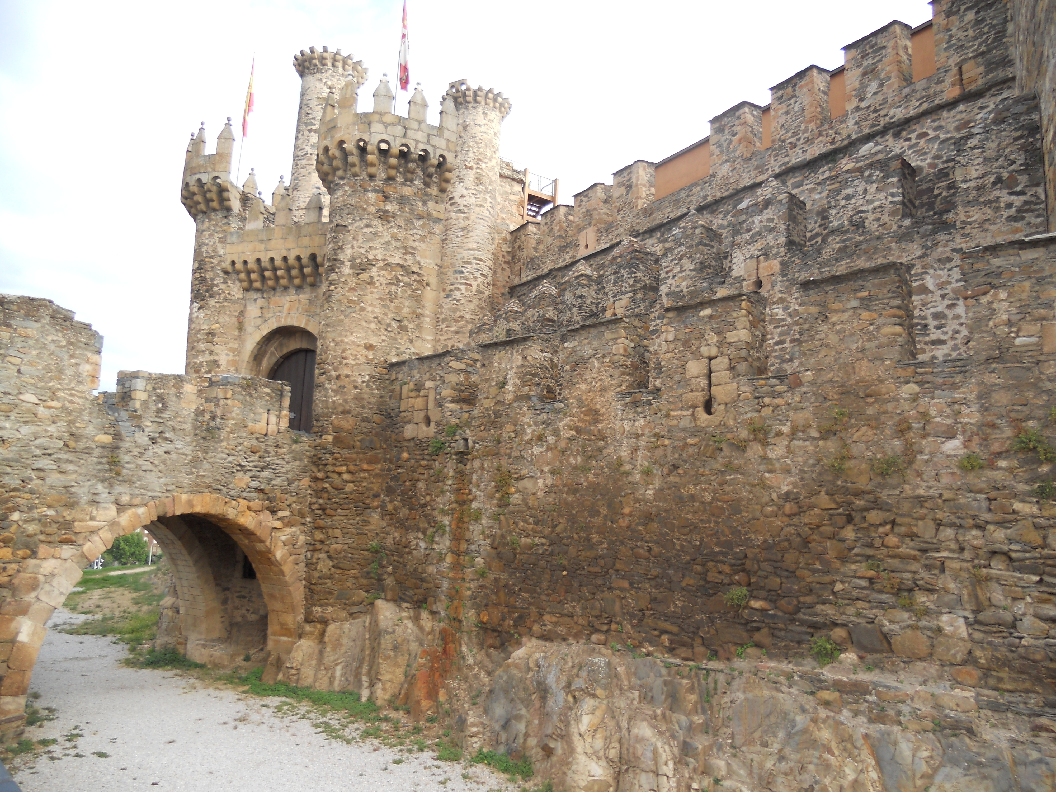 Castillo templario de Ponferrada (El Bierzo, provincia de León).